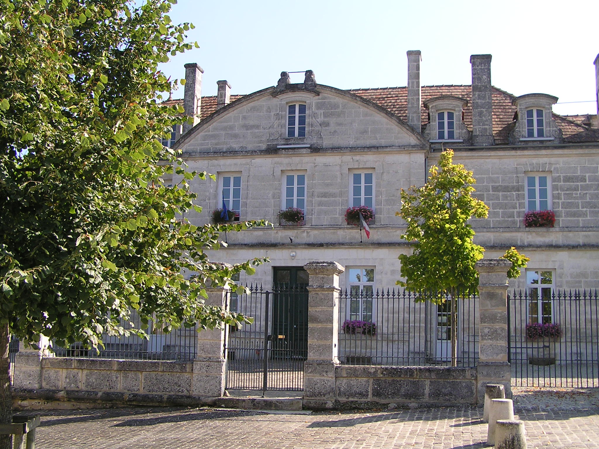 mairie de Torsac